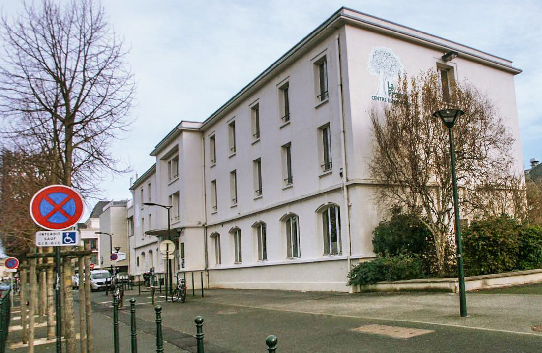 Centre d'animation La Prairie à Caen - Jan 2016 -Accès depuis l'avenue Albert Sorel.